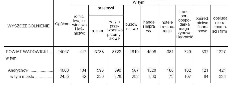 Struktura gospodarcza Andrychowa na podstawie GUS, 2007